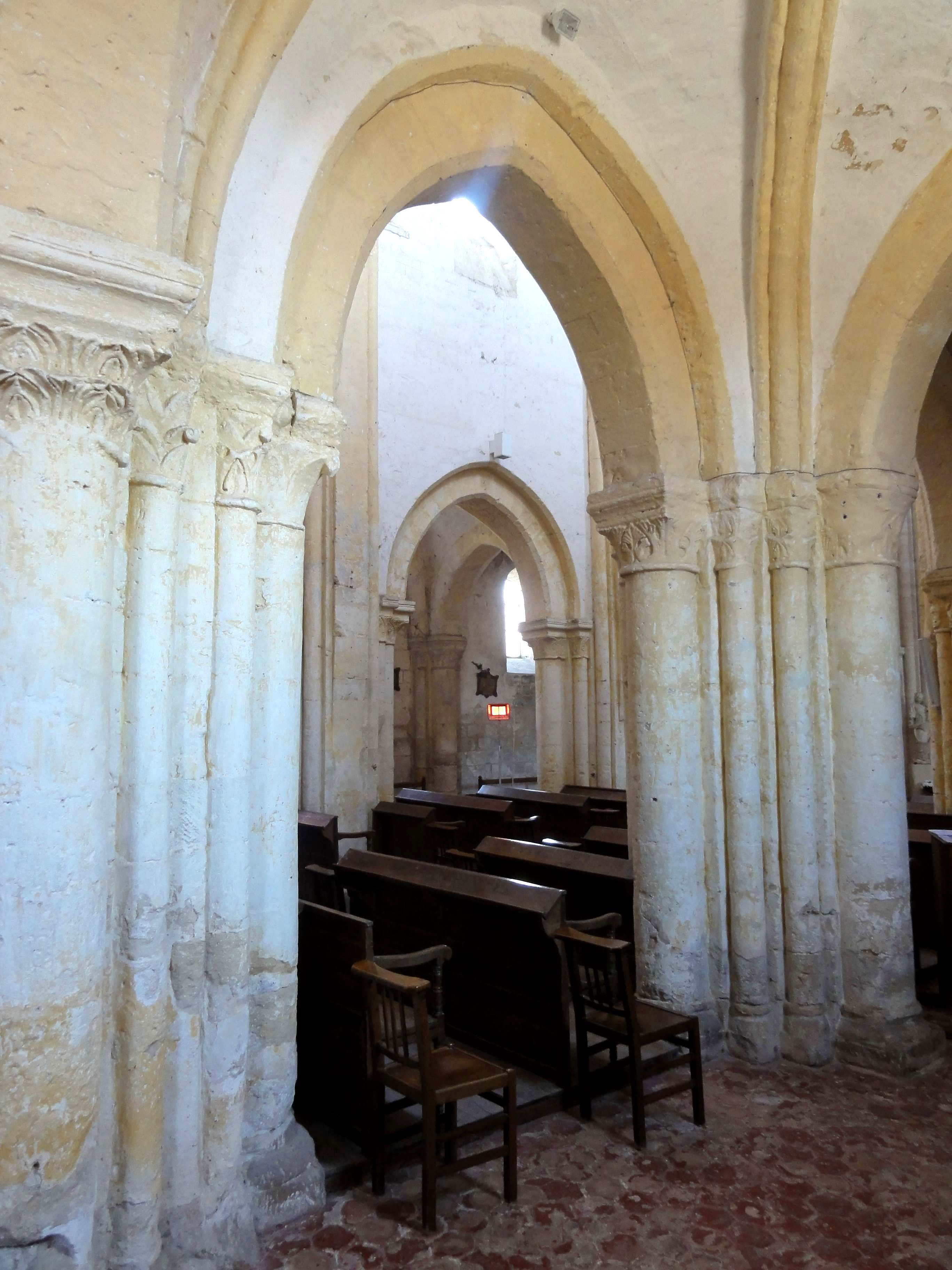 Intérieur de l'église - voir titre.